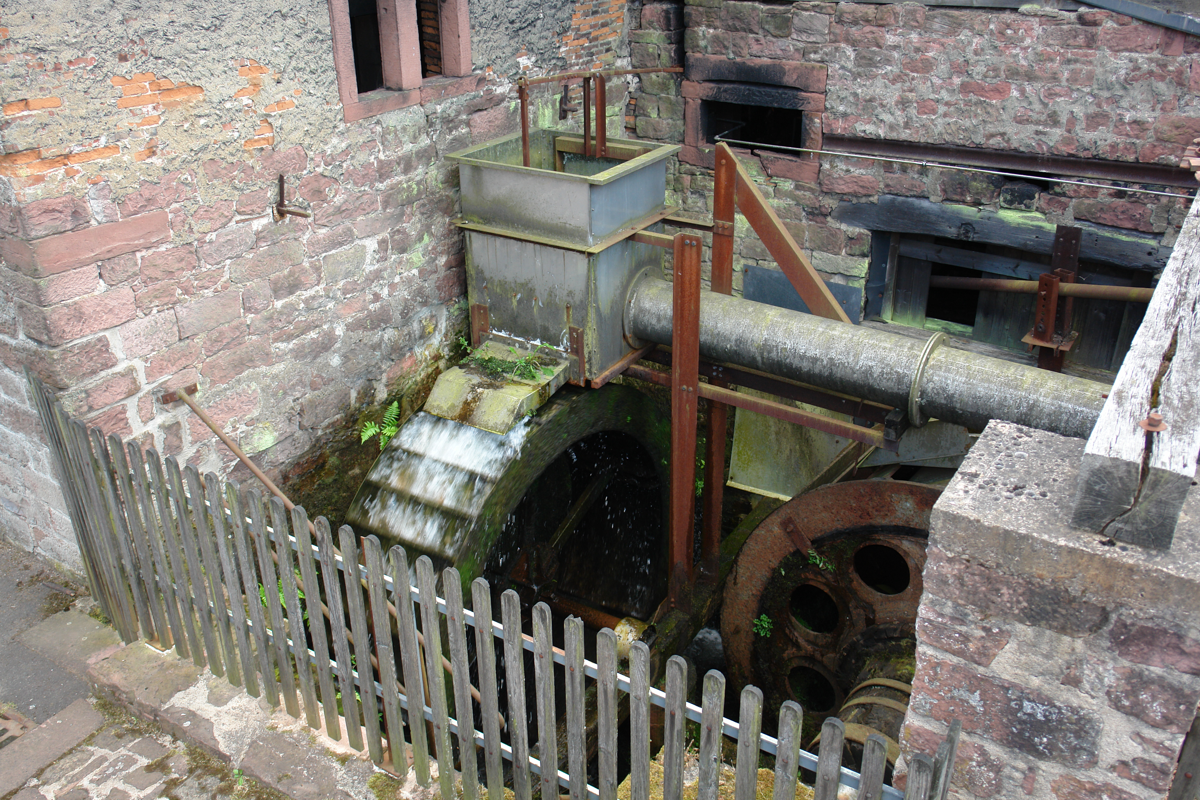 Wasserräder des Eisenhammers von Hasloch